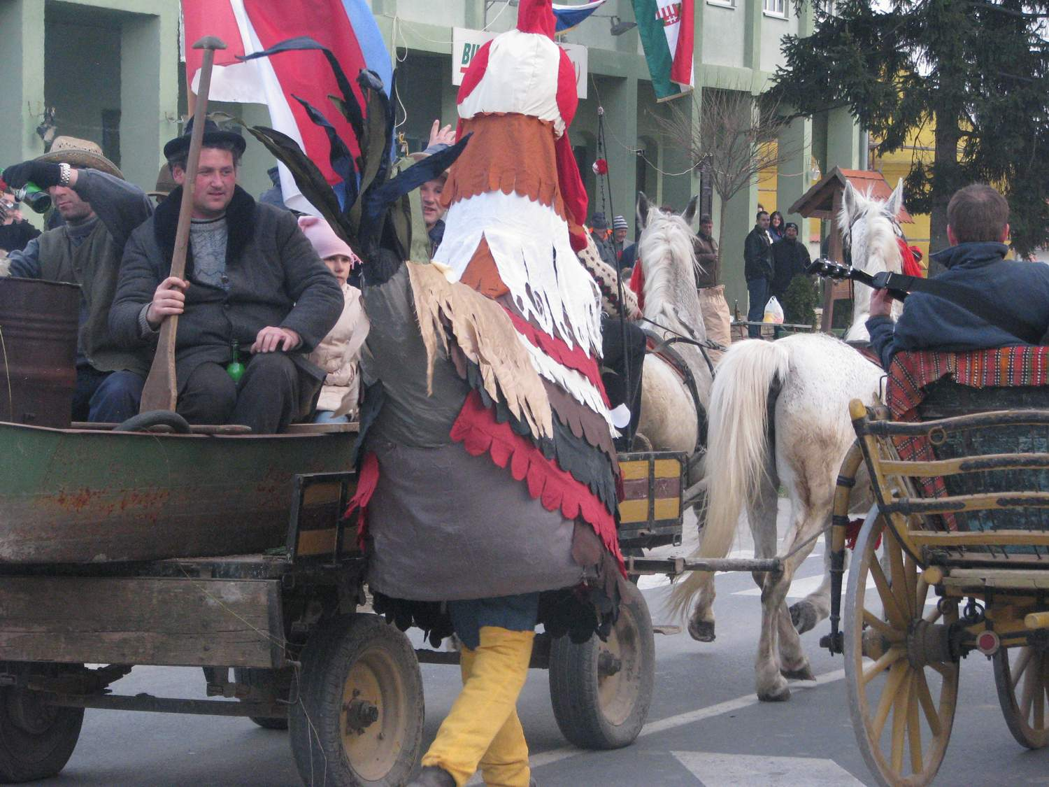 mađarski narodni običaj Kakasütés, Vardarac